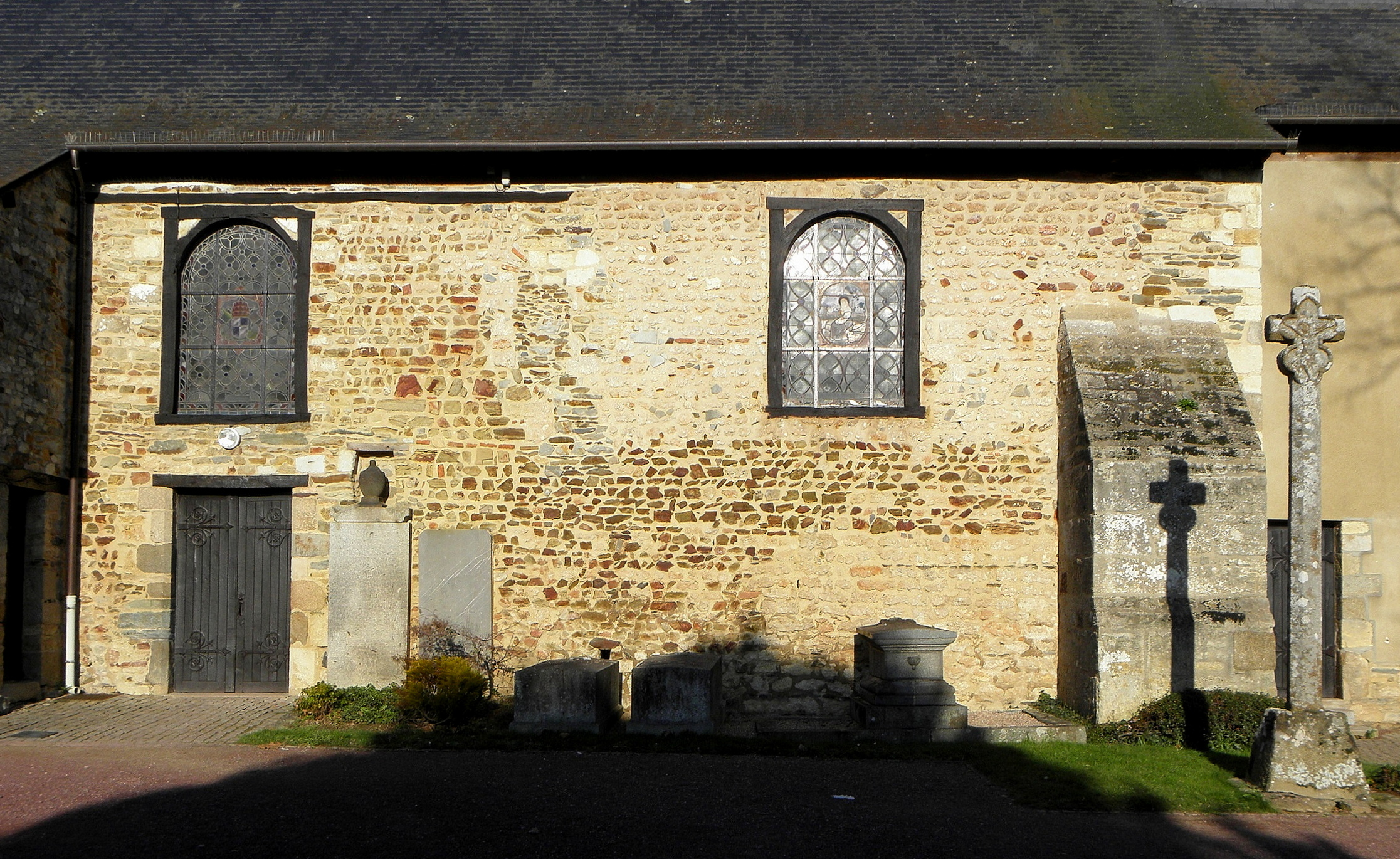 Église Saint-Grégoire, commune de Saint-Grégoire (35). Édifice désorienté au XIXe. Costale sud de la nef. Mur roman avec réemploi de briques romaines.